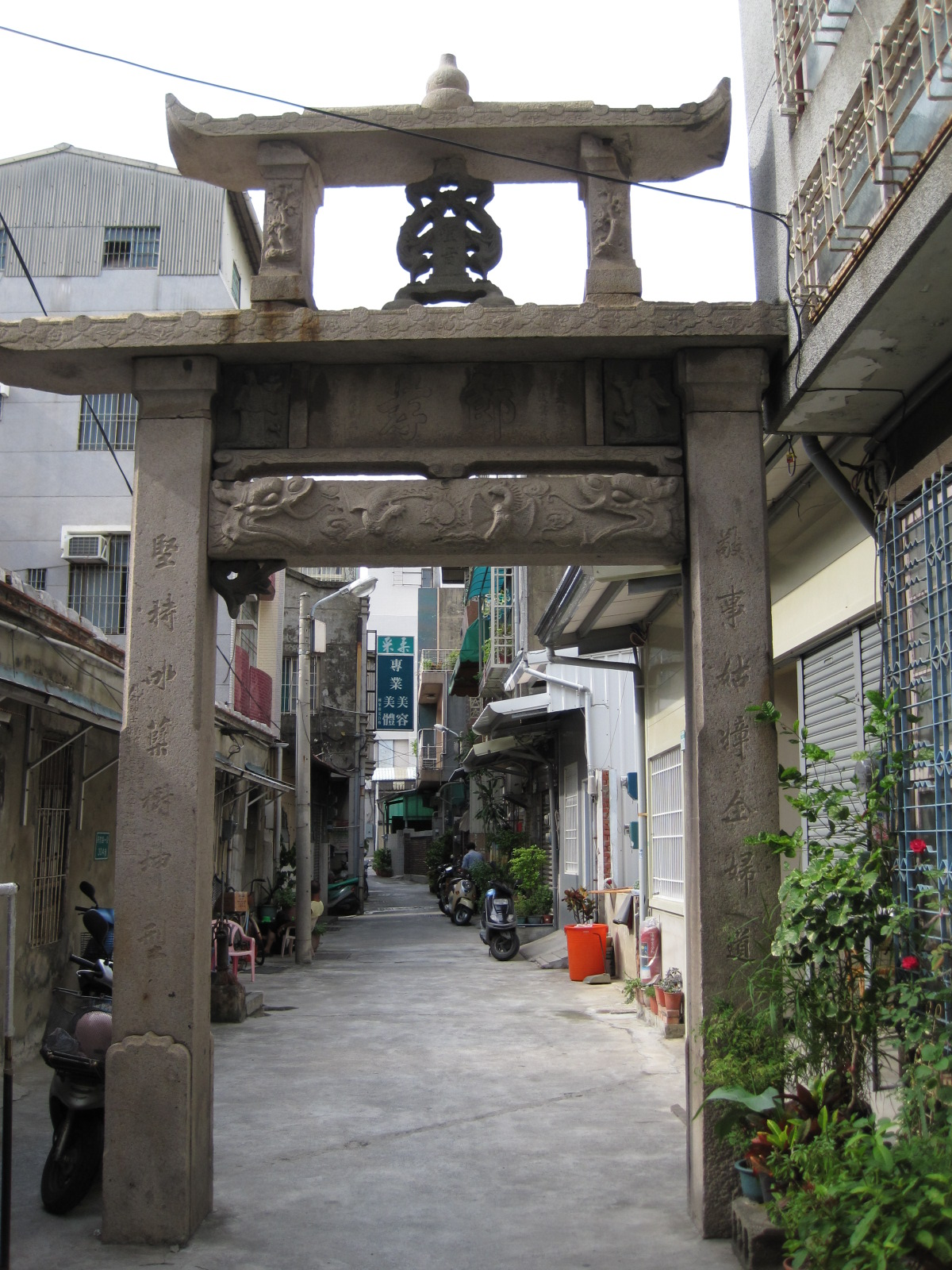 臺南市的蕭氏節孝坊